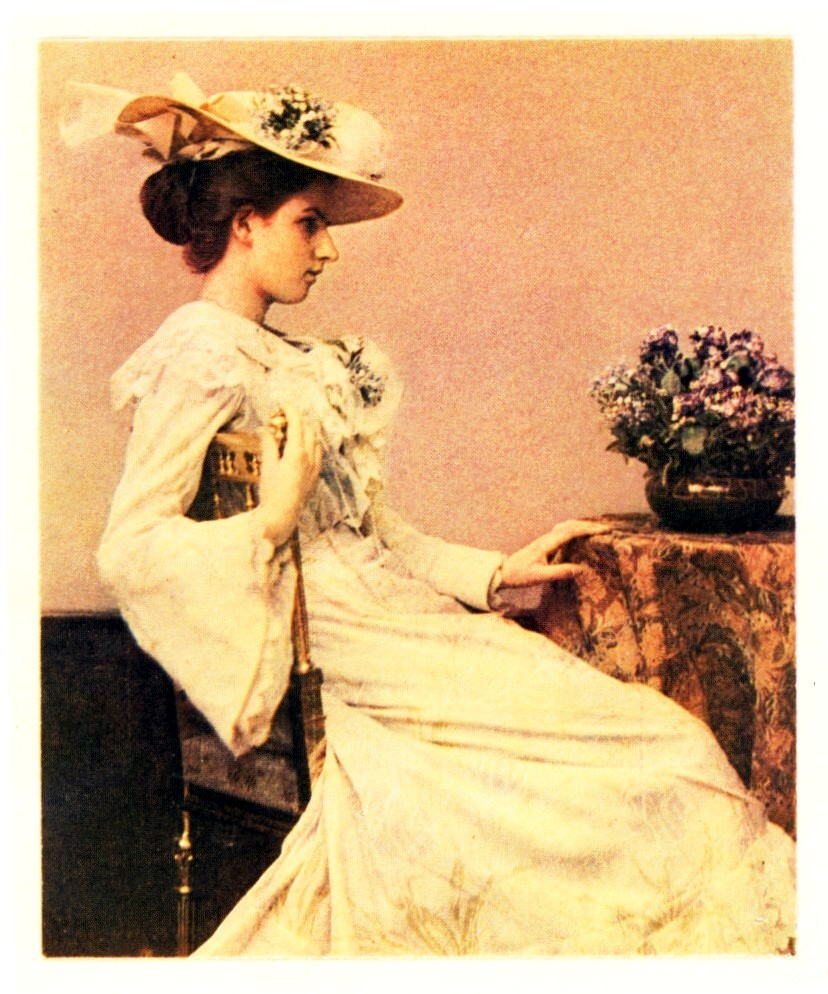 Zeitige Drei-Farben-Pinatypie.